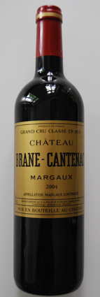 Aufnahme einer Weinflasche Château Brane-Cantenac